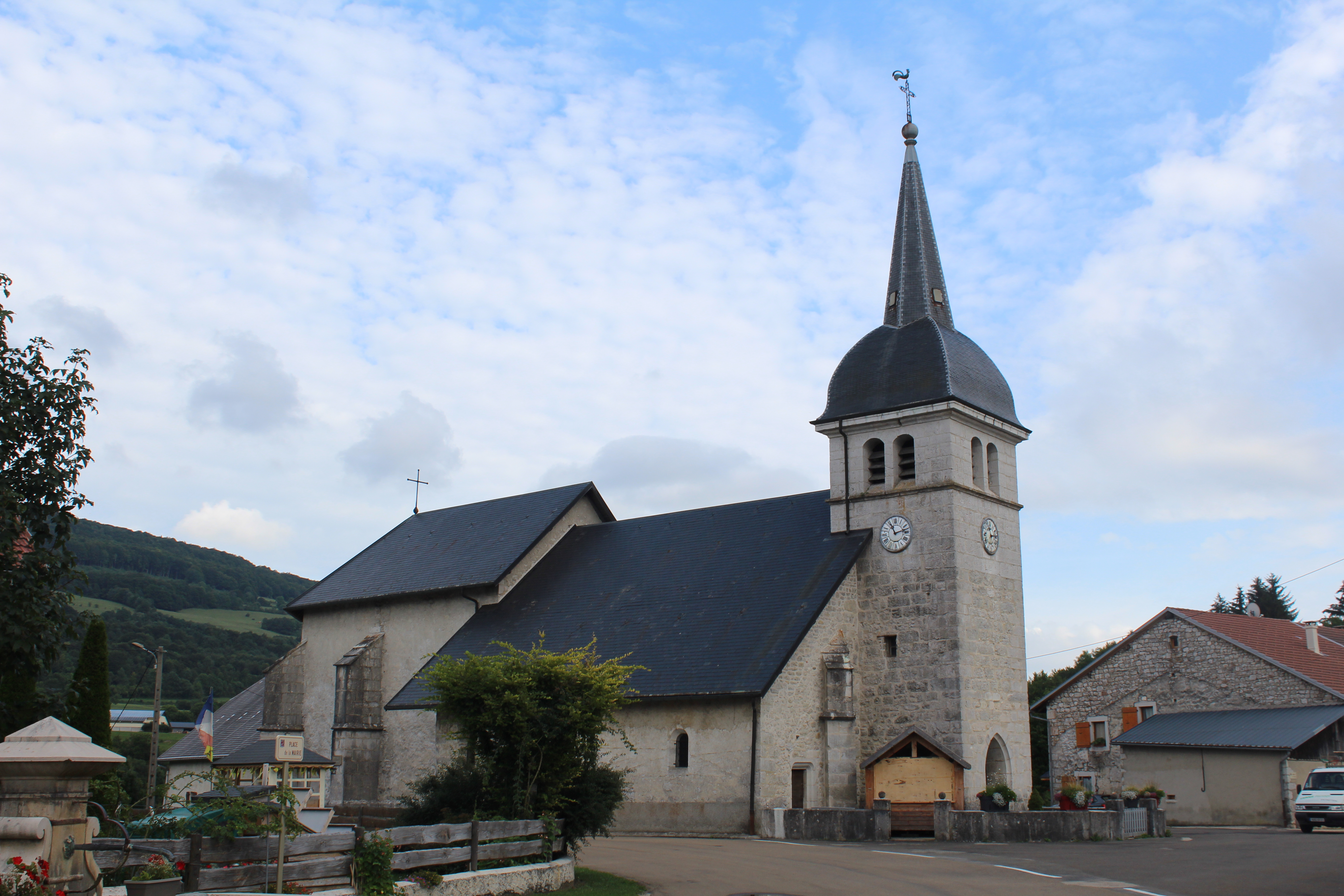 Unknown language: Église Saint-Étienne du Petit-Abergement, Haut-Valromey.